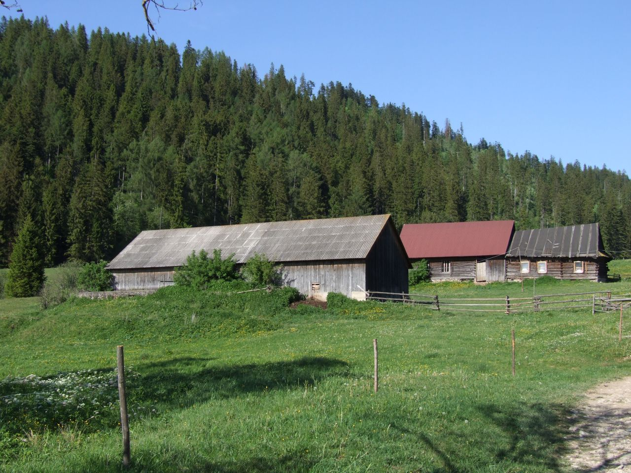 Jurgowskie Stajnie w miejscowości Dursztyn w Pieninach Spiskich